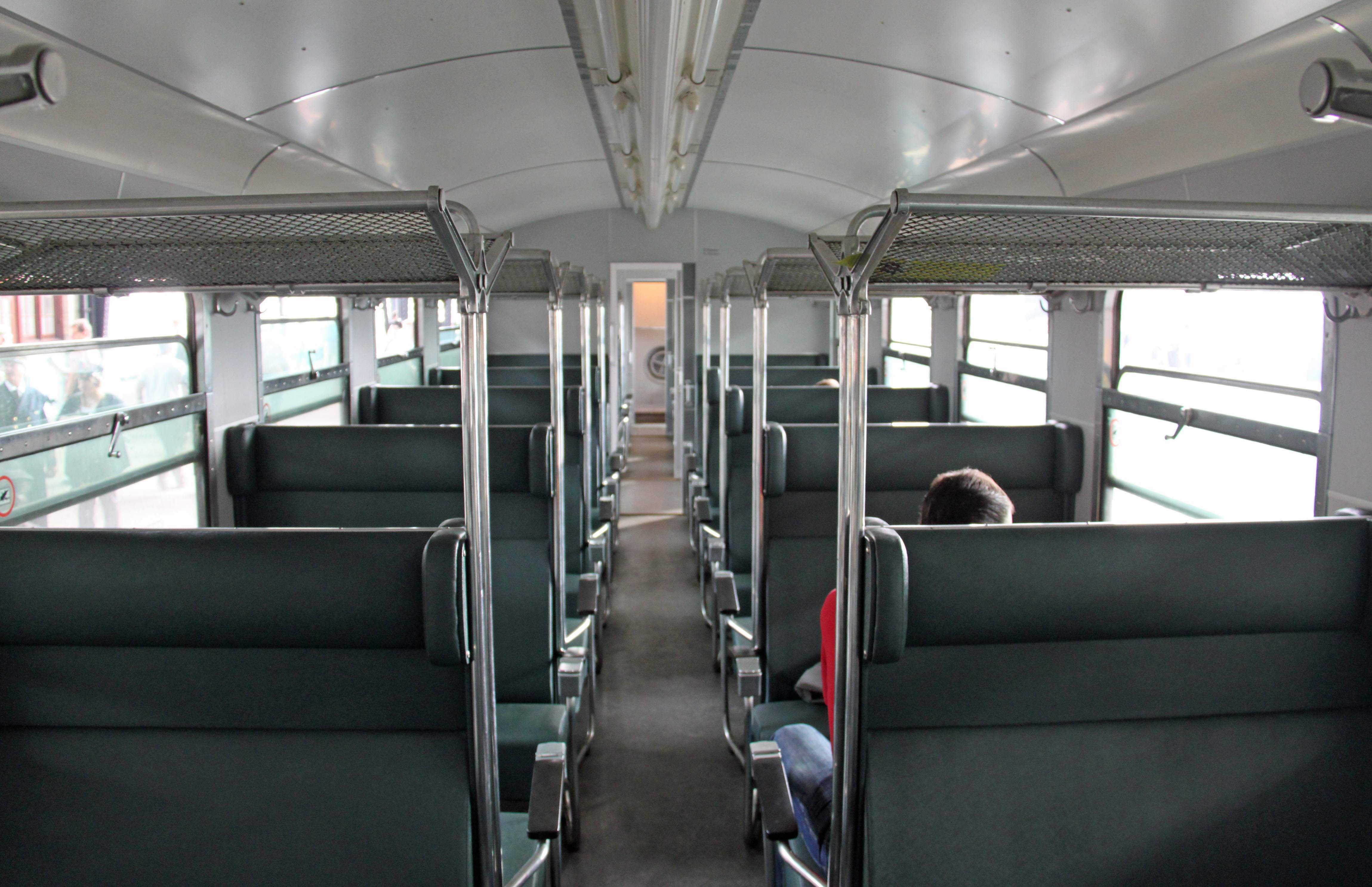 Zicht op het interieur van een rijtuig van Plan E van het Nederlands Spoorwegmuseum.